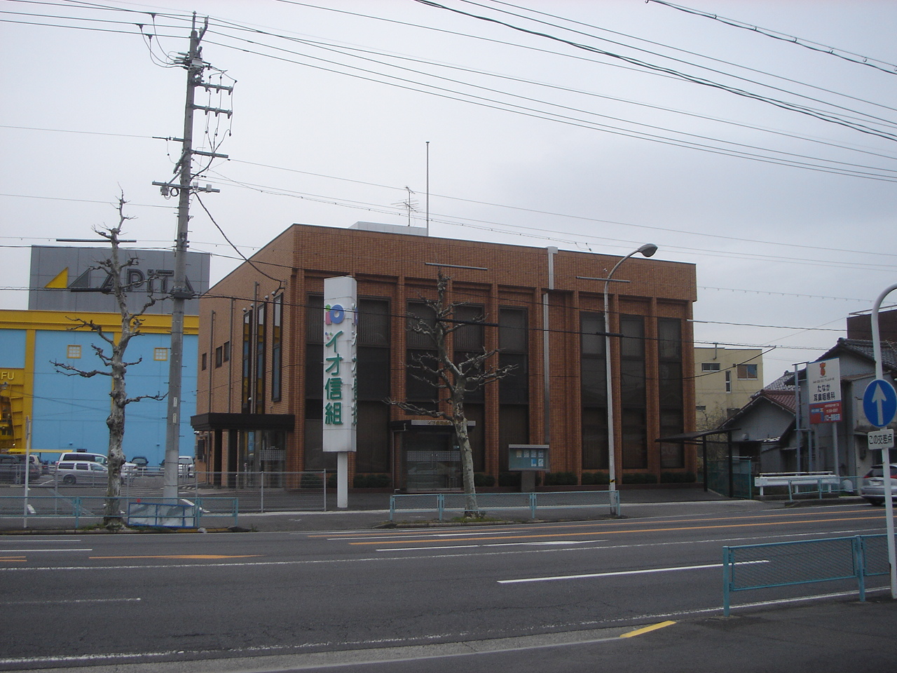 Io Shinyoukumiai（イオ信用組合本店）,Gifu,Gifu,Japan(岐阜県岐阜市加納桜田町)で撮影